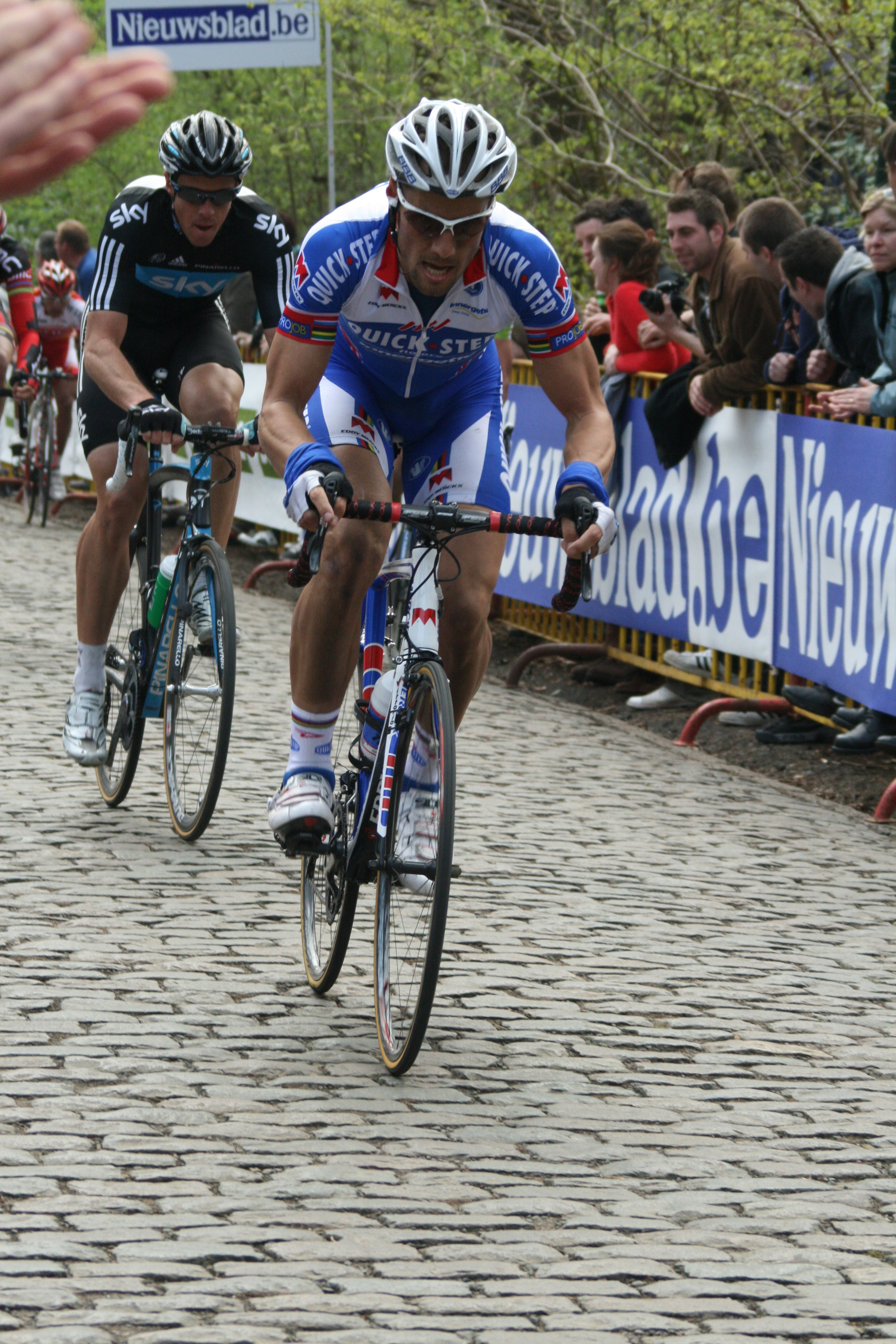 Gent-Wevelgem 2011, Kemmelberg